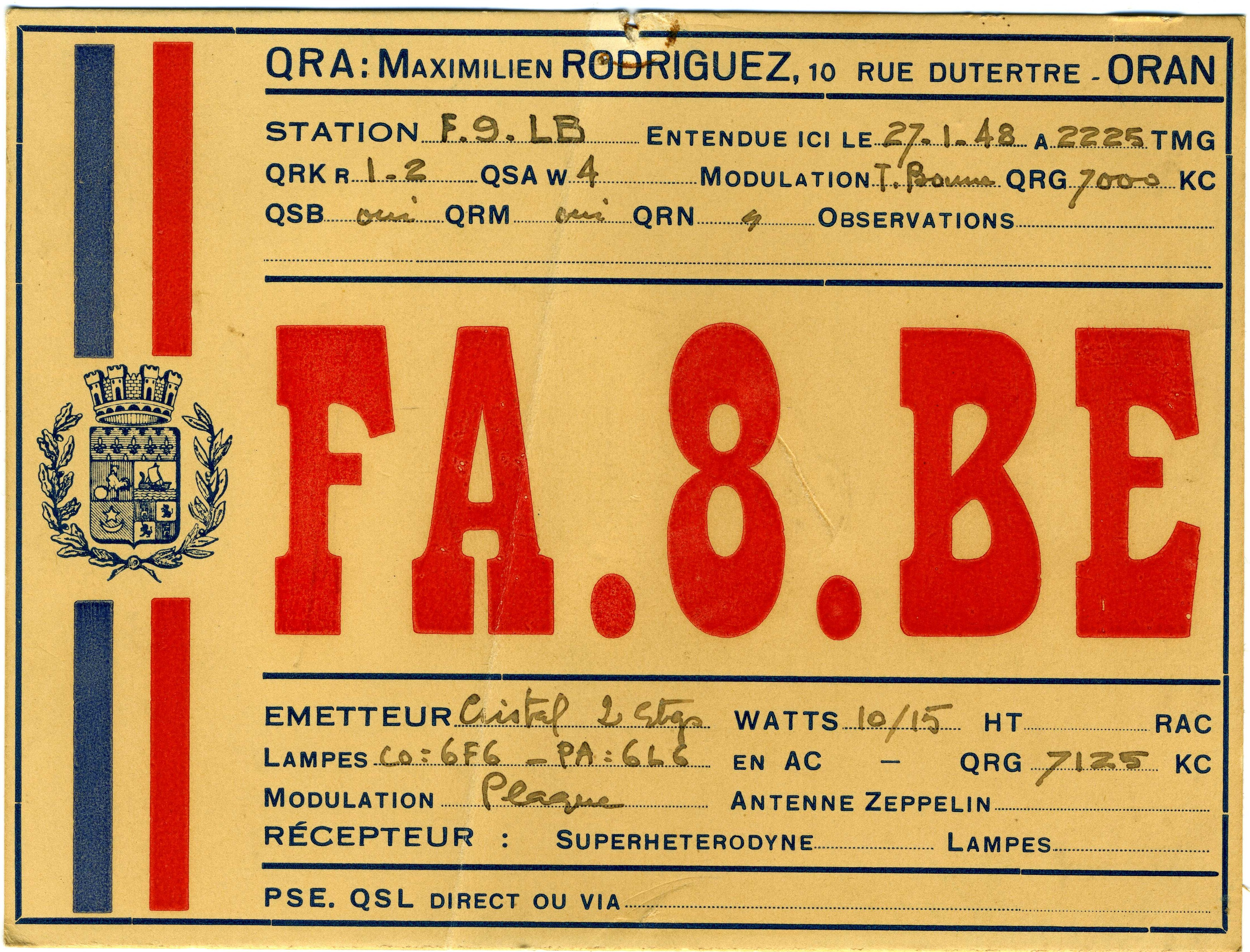 Carte QSL de (Algérie) envoyée à F9LB (France), janvier 1948.